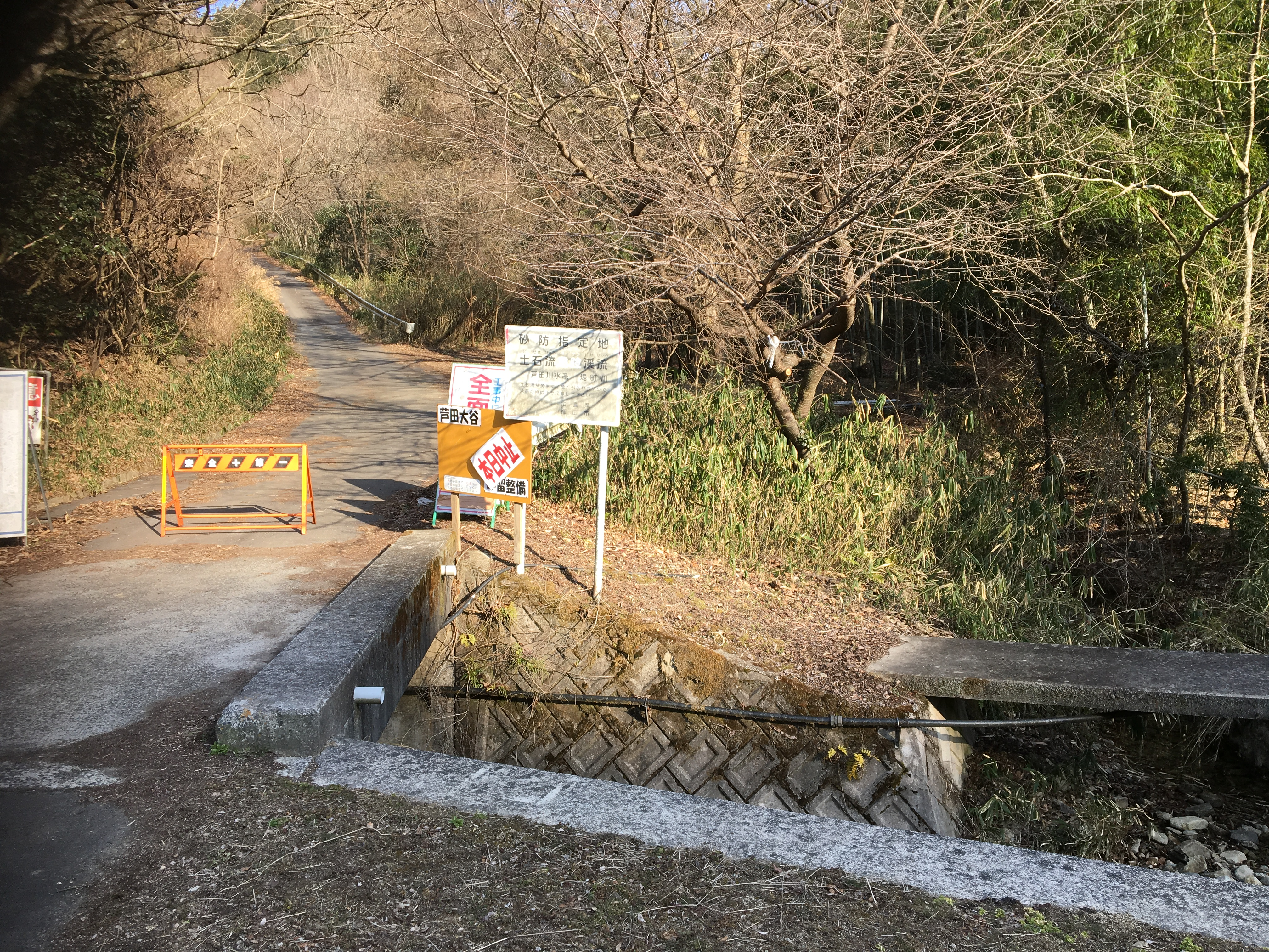 広島県福山市芦田町上有地大谷にある大谷砂留が設置されている渓谷の入り口